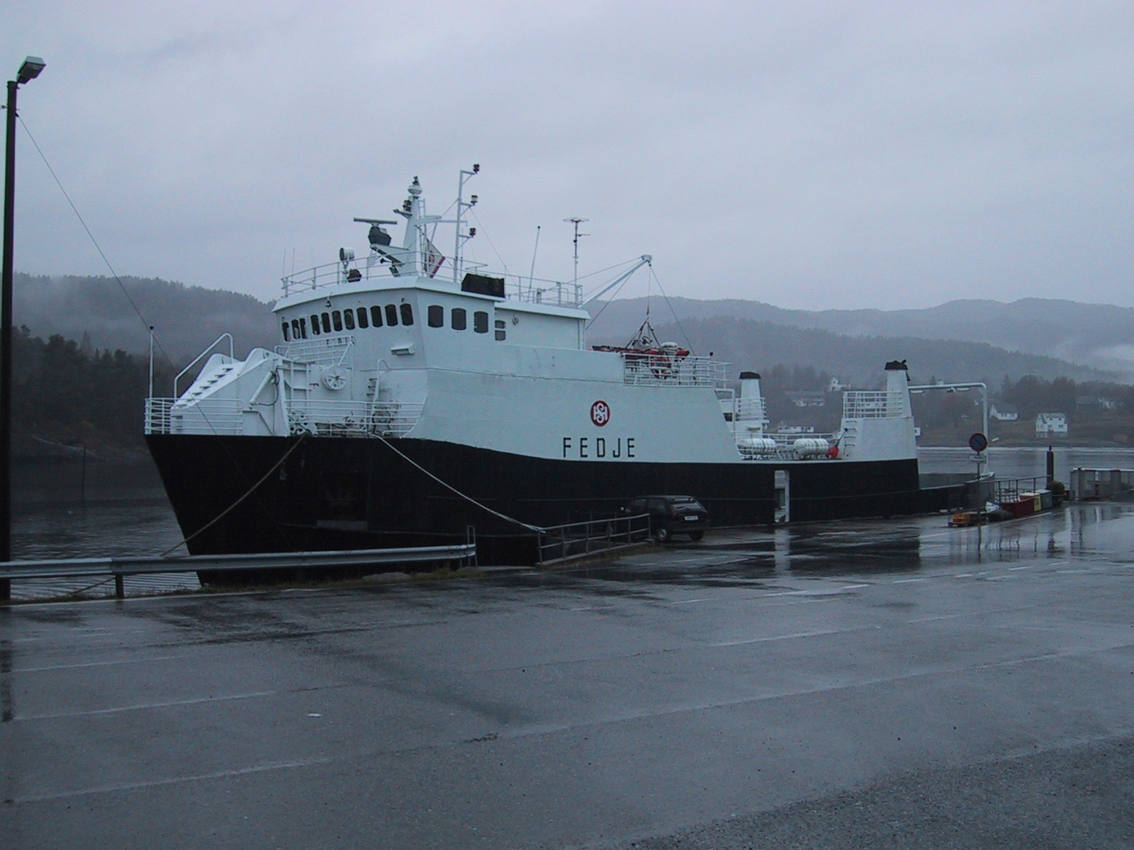 M/F Fedje, built in 1970.